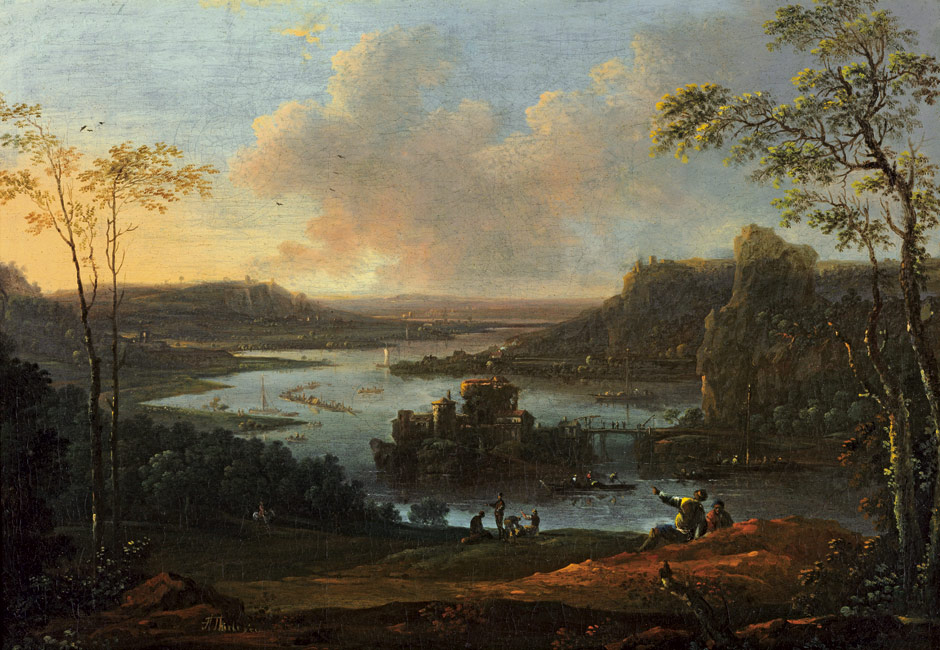 J. A. Thiele, Phantastische Elblandschaft mit Lastkähnen und reicher Staffage, Öl auf Leinwand. 37 x 52,8 cm. signiert "JA.Thiele fecit". Um 1730.